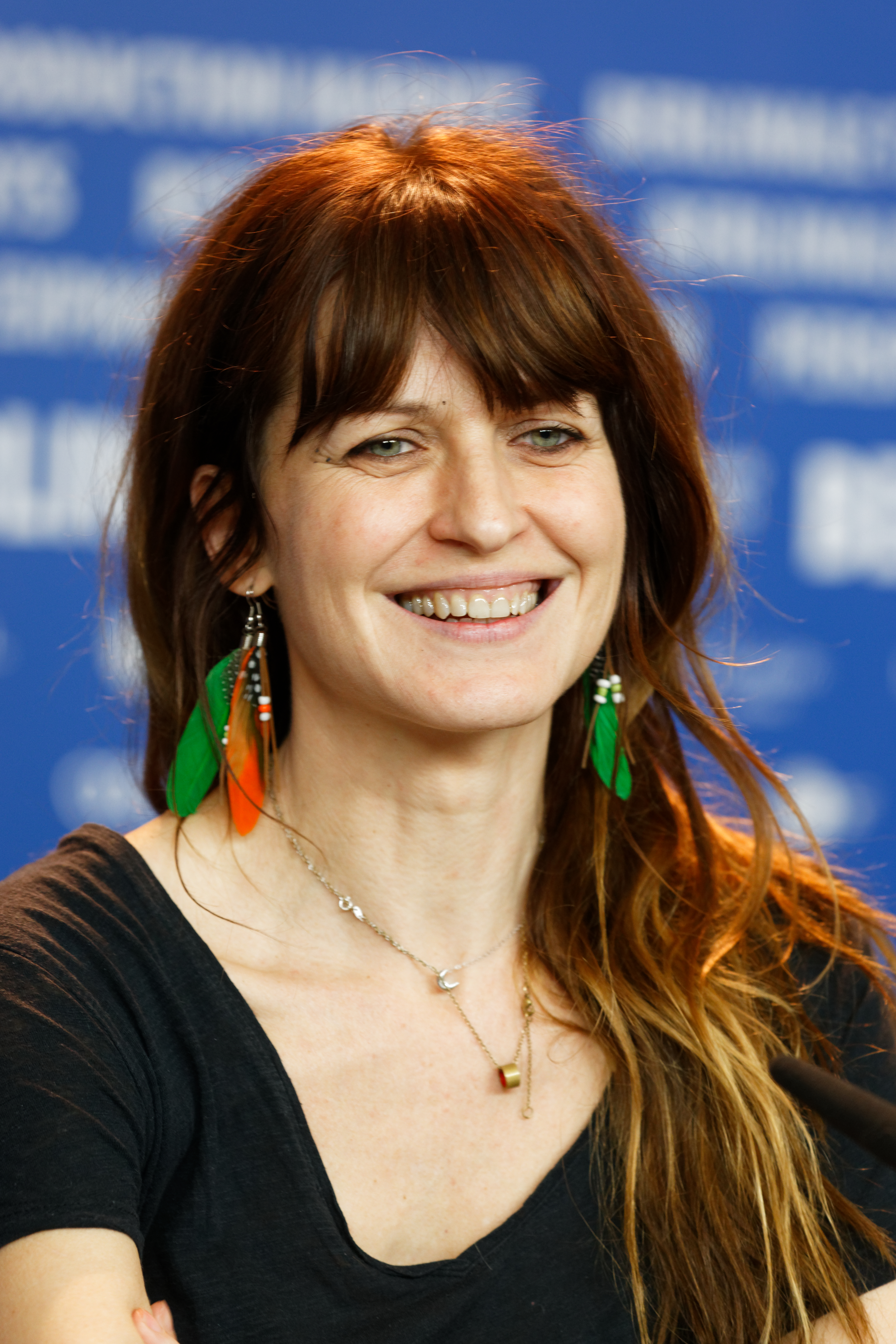 Arly Jover bei der Pressekonferenz zu Masaryk / A Prominent Patient bei der Berlinale 2017